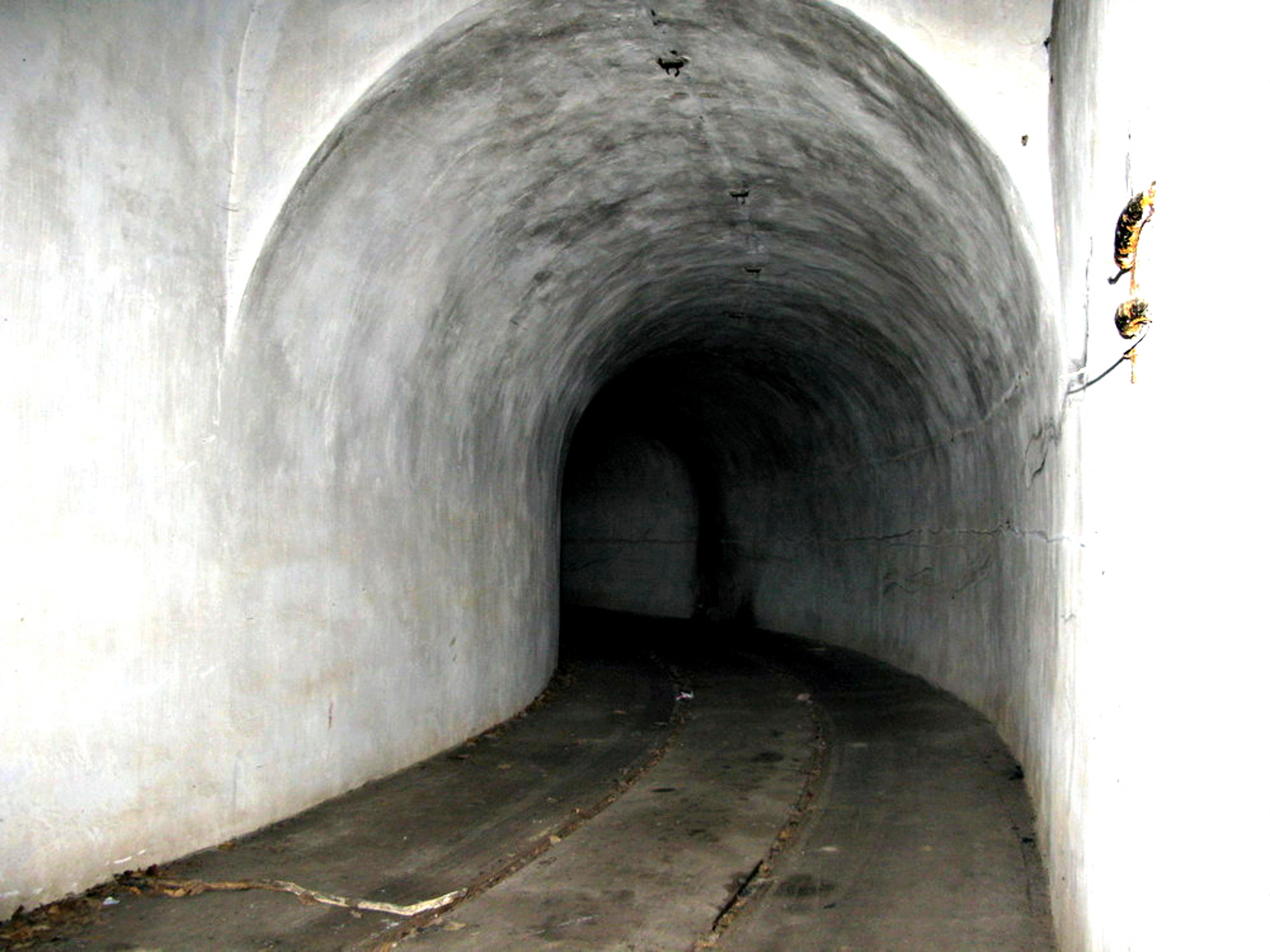 Тоннель, ведущий к месту сборки атомных бомб. Краснокаменка (Кизилташ) Феодосийский горсовет. Крым. Украина.